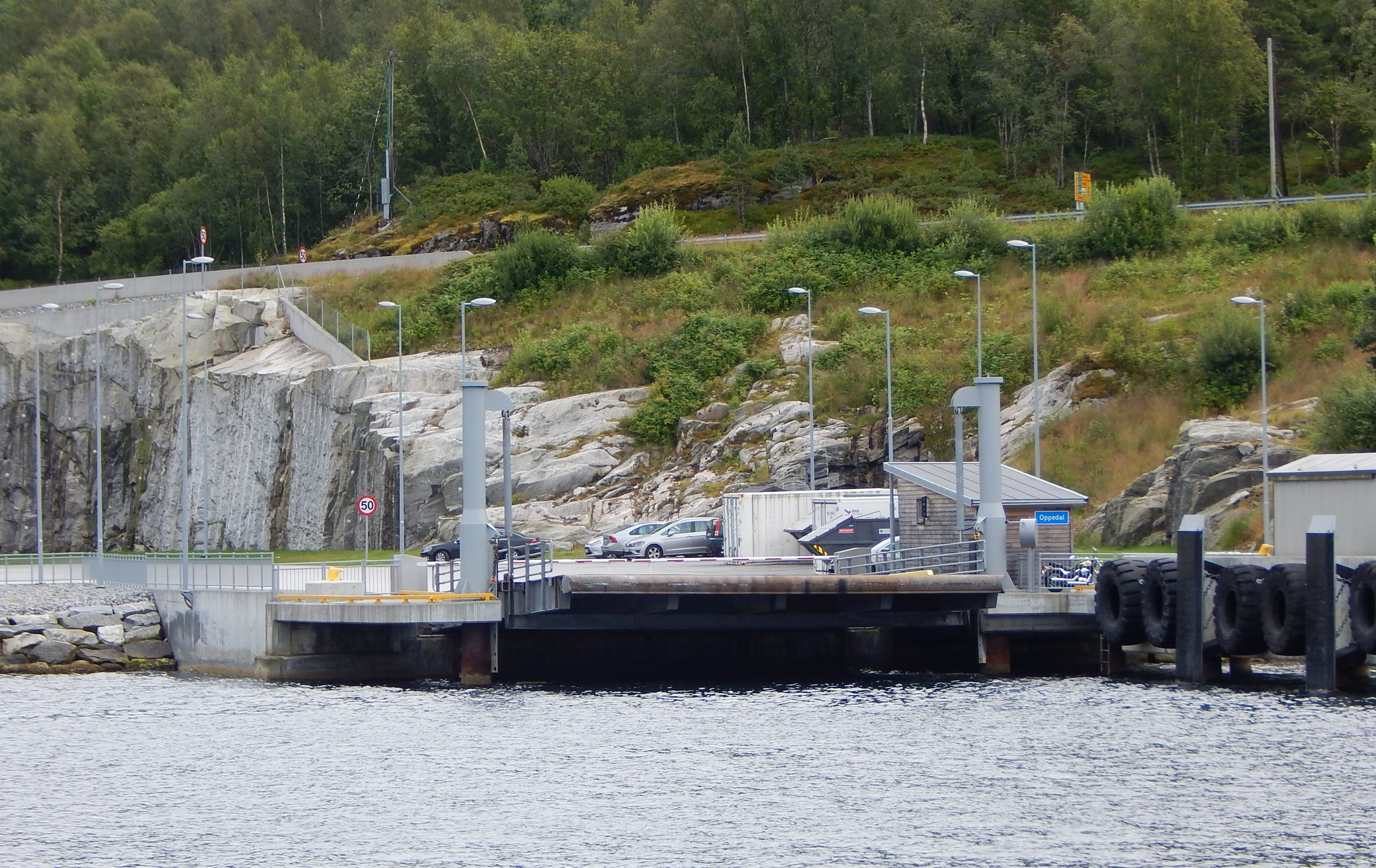 Inn mot Oppedal fergekai